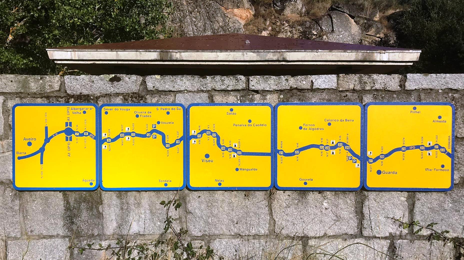 Diagrama representando os nós e equipamentos do IP 5, no Parque de Descanso do troço Alvendre-Porto da Carne (Guarda)